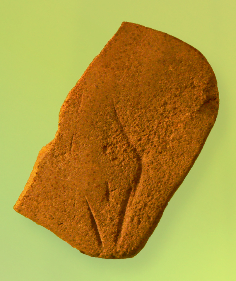 Venus von Bierden in der Sonderausstellung Im Goldenen Schnitt – Niedersachsens längste Ausgrabung, die zwischen August 2013 und März 2014 im Niedersächsischen Landesmuseum gezeigt wurde.